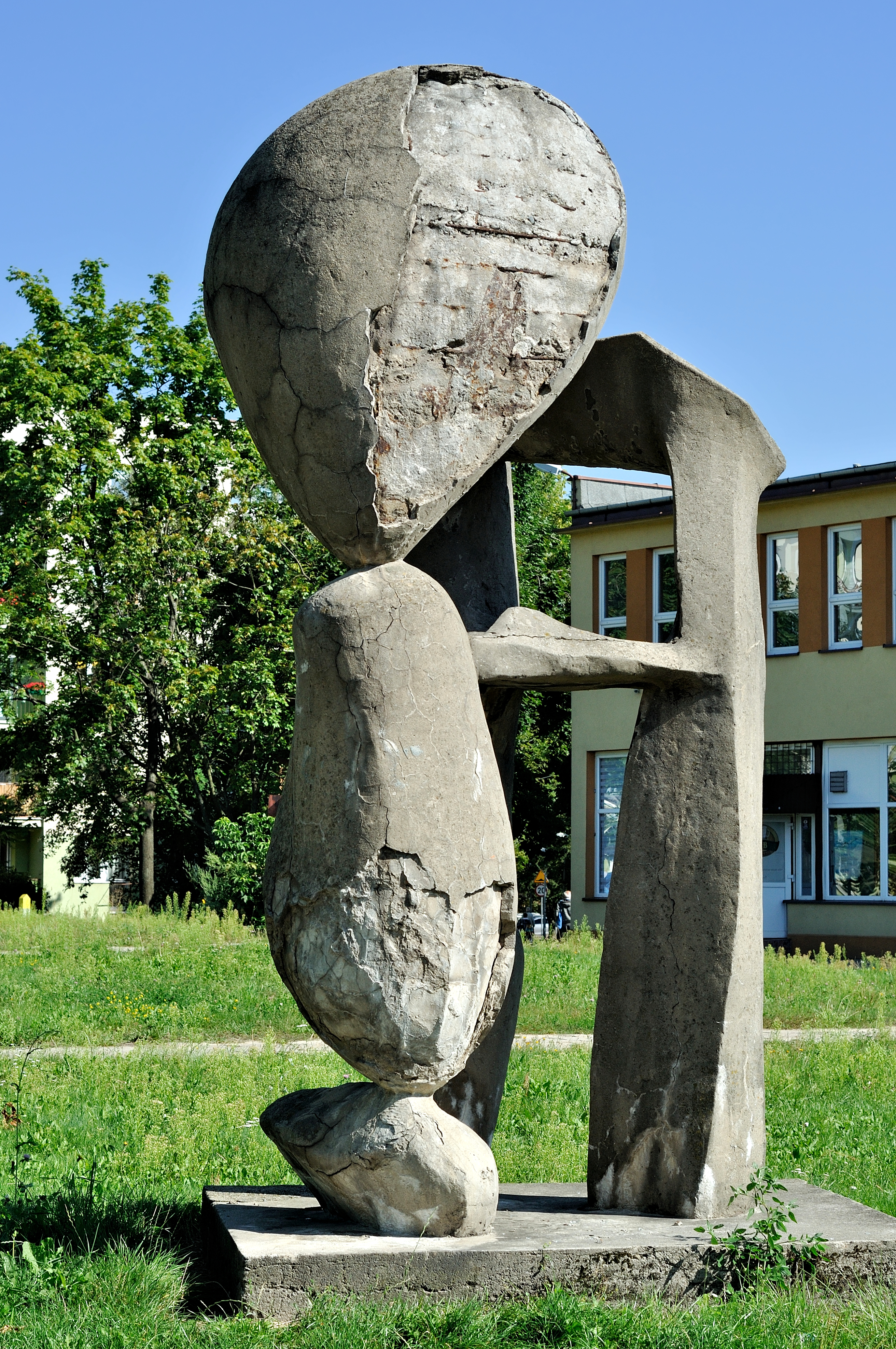 Mielec, rzeźba Brzemię (Ludmiła Stehnova 1969)